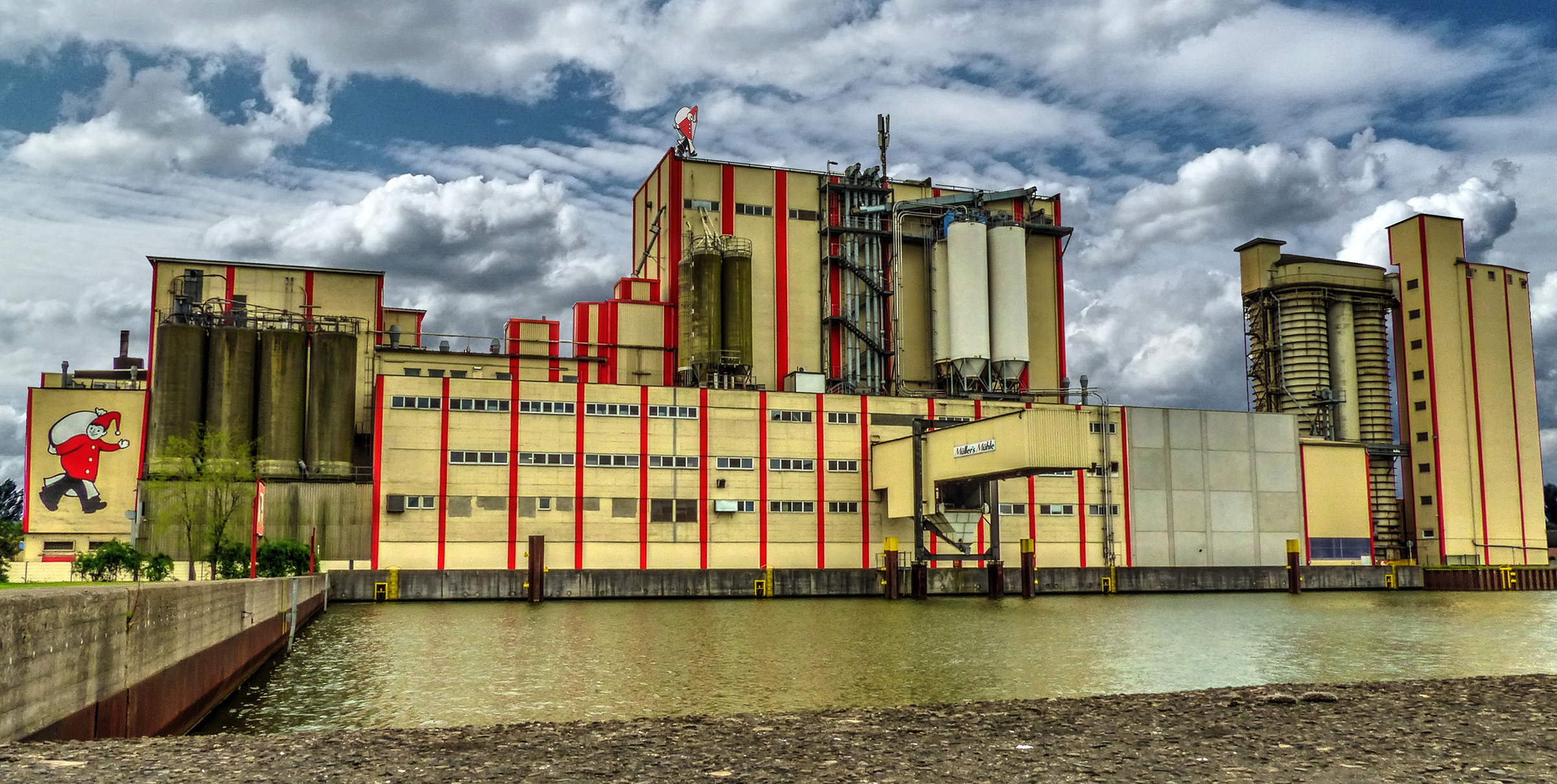 Müller's Mühle, Reismühle für Reis und Hülsenfrüchte in Gelsenkirchen Stadthafen!